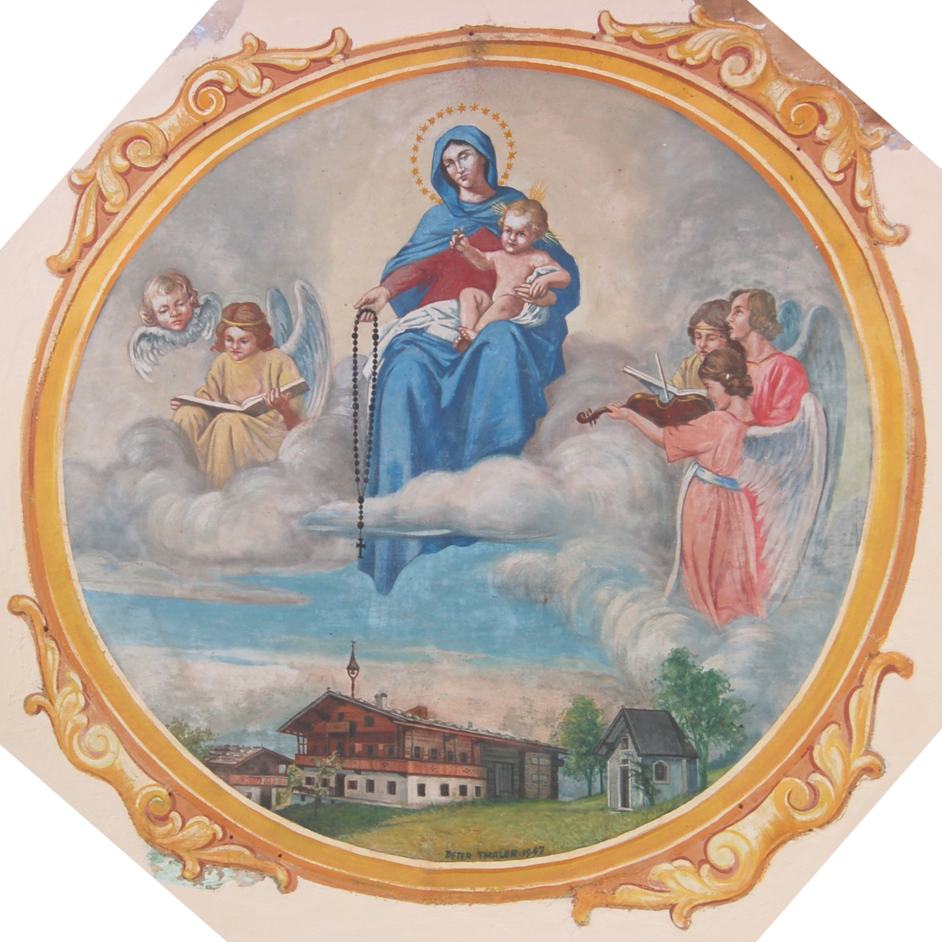 Deckengemälde der Kapelle zu Vorderegg bei St. Johann in Tirol von Peter Thaler This media shows the remarkable cultural object in the Austrian state of Tyrol listed by the Tyrolean Art Cadastre with the ID 14689.